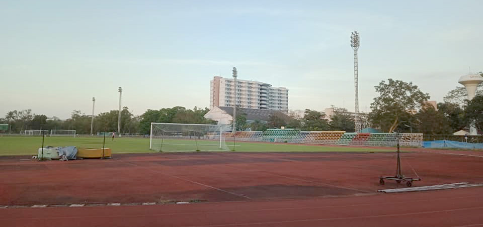 Mahidol University Salaya Campus Stadion